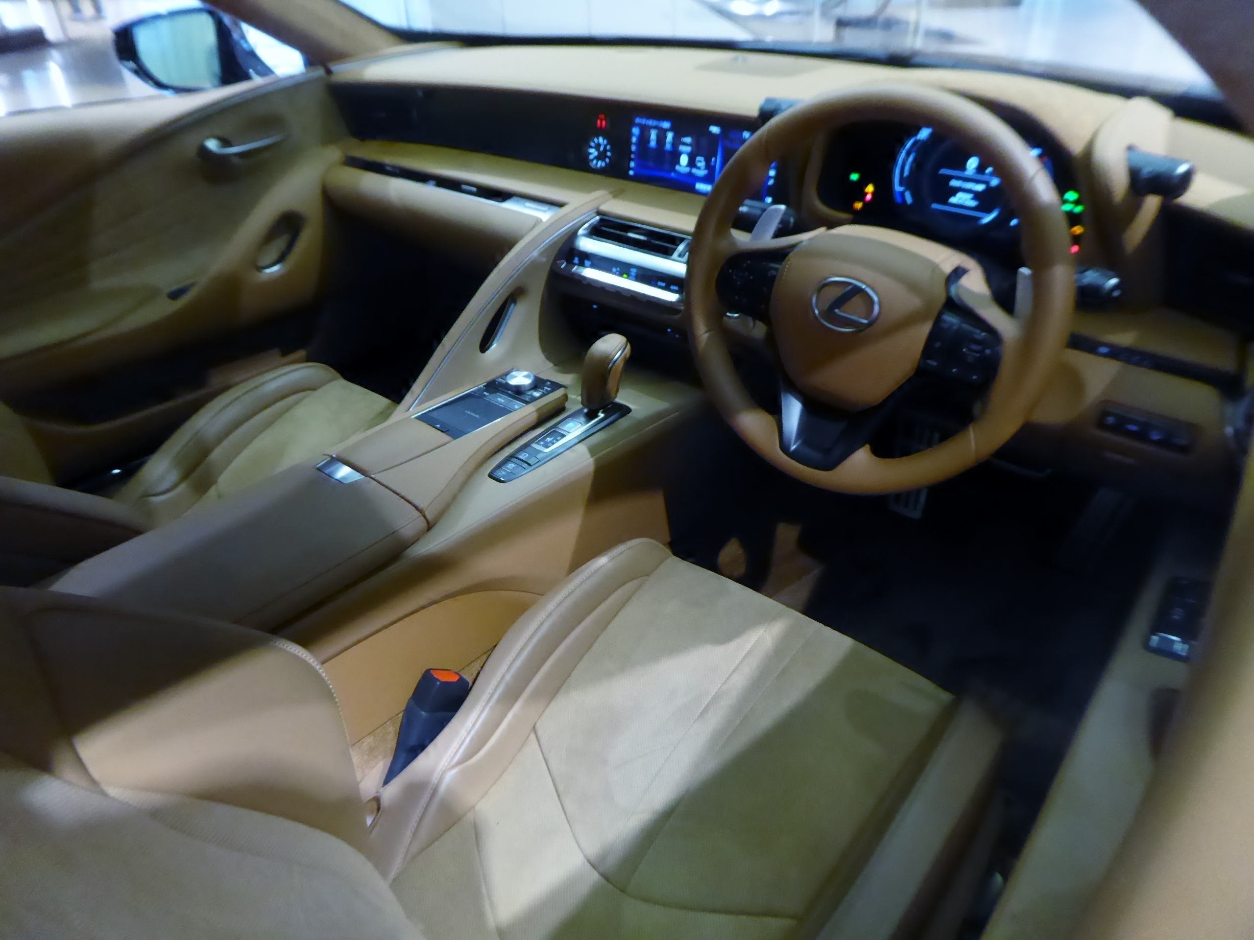 DAA-GWZ100-ACVBB型レクサス・LC500h"S package"のインテリアを撮影。